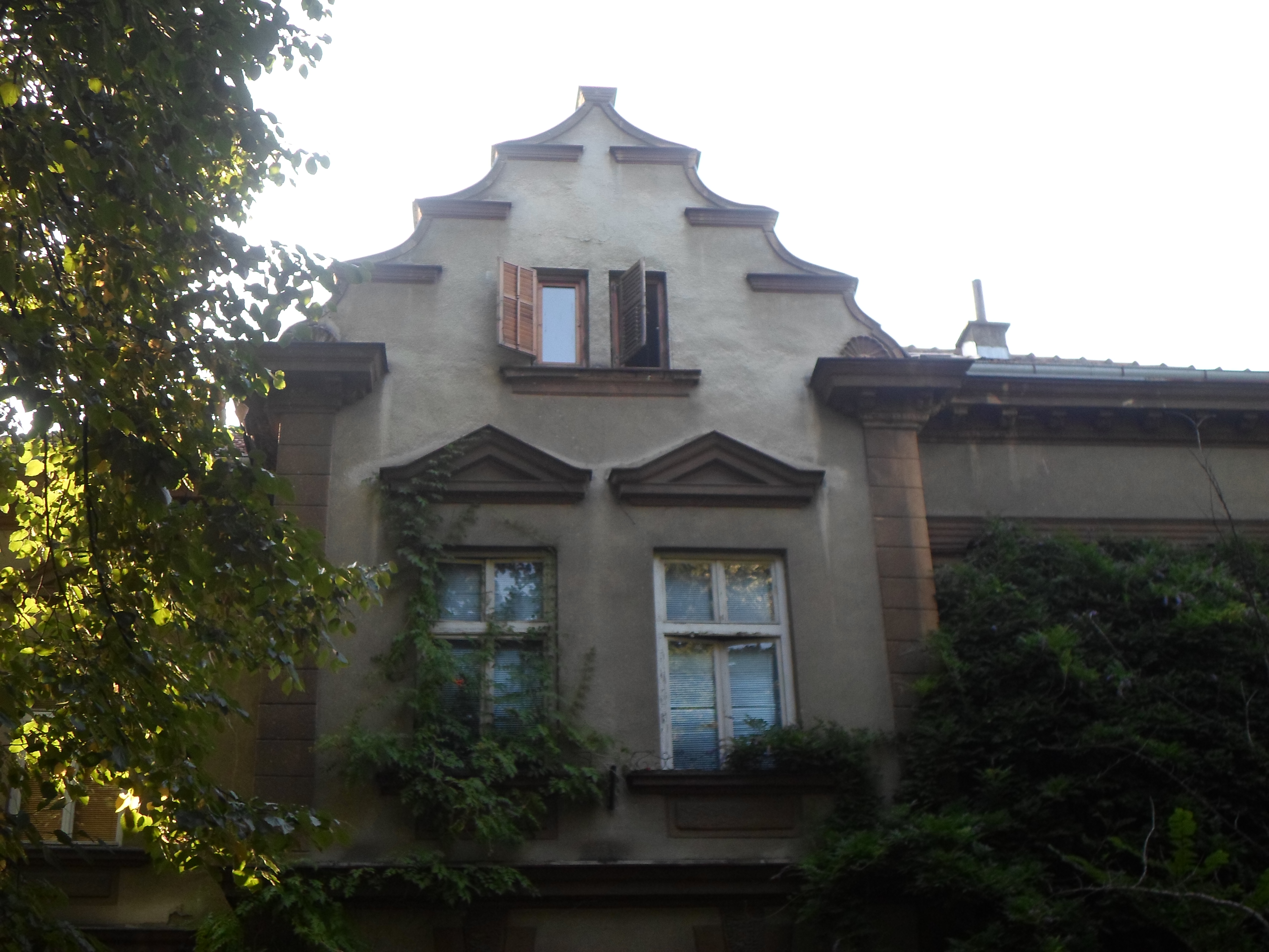 Објекат у улици Краља Петра I Карађорђевића 41 This image was uploaded as part of Trace of Soul 2015.